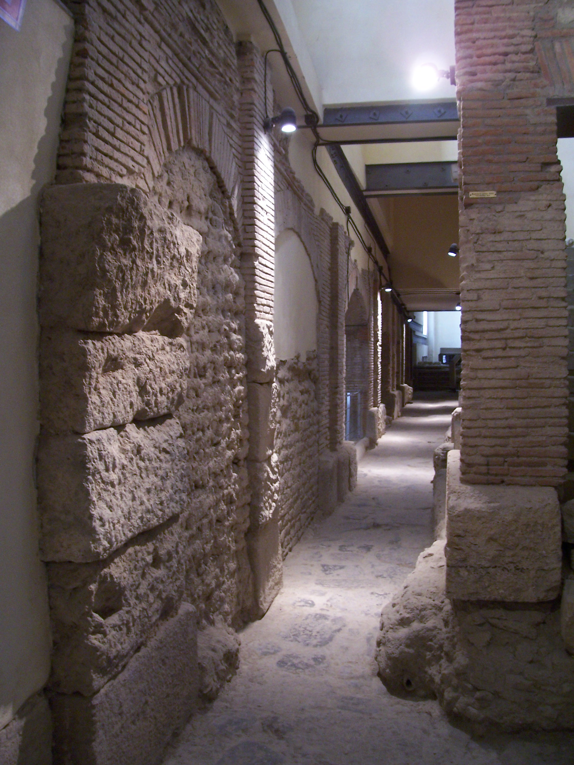 El antiguo decumano enterrado.